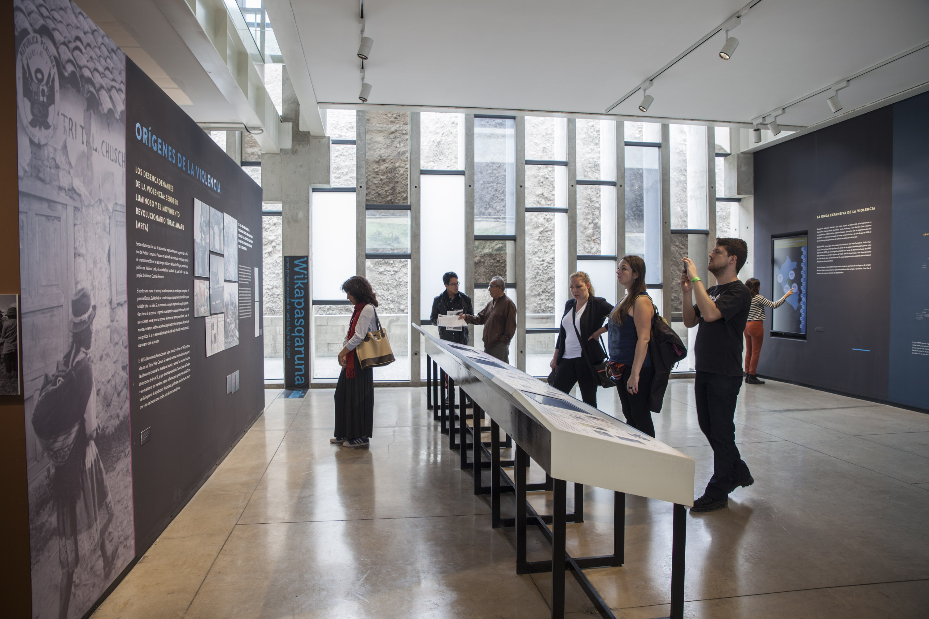 Sala de la exposición permanente del Lugar de la Memoria